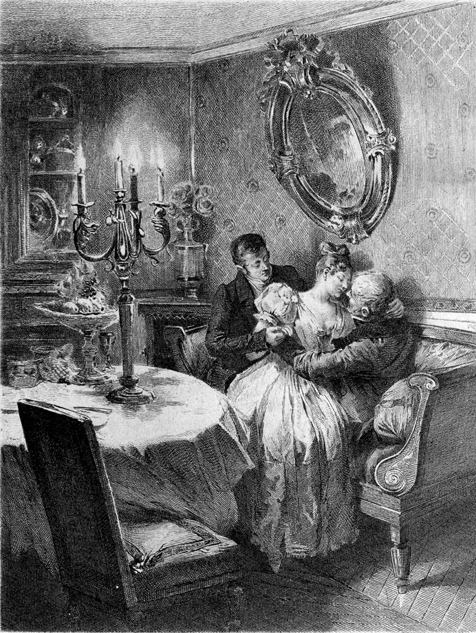 Title page of Honoré de Balzac's Old Goriot (1834).